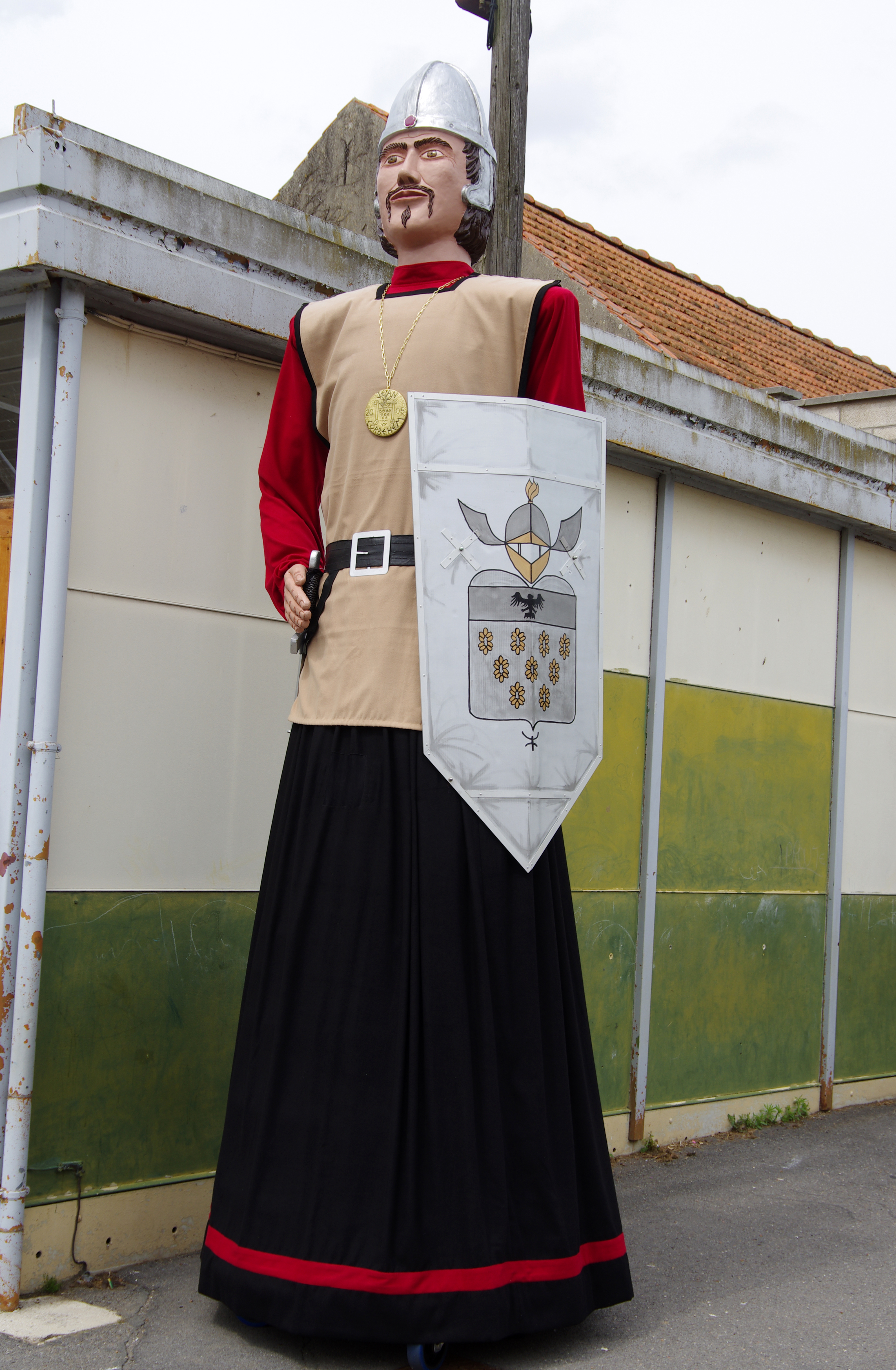 Roclincourt (Pas-de-Calais, France) - Animation festive (dans la cour de l'école) pour le "baptême" du géant local Albert la main verte. Le géant Jean de Corbehem. .